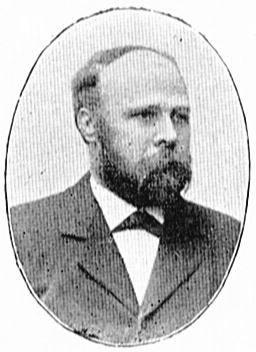 Arkitekten Olof Jonson